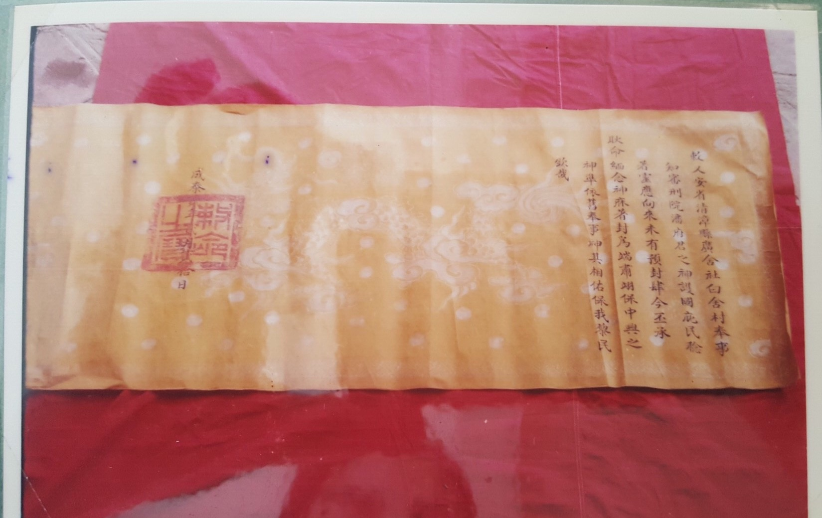 Đây là một trong những sắc phong Tiến sĩ Phan Nhân Tường, đậu tiến sĩ triều vua Lê Trang Tông, còn lưu giữ đến ngày nay (Tư liệu lưu giữ tại Ban quản lý di tích Nghệ An) Phiên âm: Sắc Nghệ An tỉnh, Thanh Chương huyện, Hoàng Xá xã, Bạch Xá thôn. Phụng sự Tri thẩm hình viện Phan Tướng quân chi thần, hộ quốc tý dân, nẫm trứ linh ứng, hướng lai vị hữu dự phong, tứ kim phi ưng cảnh mệnh, miện niễm thần hưu, phong vi Đoan Túc Dực Bảo Trung Hưng Chi Thần, chuẩn y cựu phụng sự, thần kỳ tướng hữu bảo ngã lê dân. Khâm thai. Thành Thái nhị niên, nhị nguyệt, nhị thập nhật. Dịch nghĩa: Sắc cho thôn Bạch Xá, xã Hoàng Xá (nay là xã Thanh Hà), huyện Thanh Chương, tỉnh Nghệ An, (nơi) thờ phụng vị thần là quan Thẩm hình viện Phan Tướng Công (Phan Nhân Tường). Thần có công giúp đỡ đất nước, che chở cho nhân dân rất là linh thiêng. Thần đã từng được dự sắc phong, nay Trẫm nhận mệnh lớn của trời, nhớ tới công lao của thần (nên) phong là: Đoan Túc Dực Bảo Trung Hưng Chi Thần. Cho phép dân được thờ phụng như cũ, ngõ hầu Thần phù hộ dân ta. Kính cẩn thay. Ngày 12 tháng 2 năm Thành Thái thứ 2 (tức năm 1890). Người dịch: Hoàng Văn Kiểm)